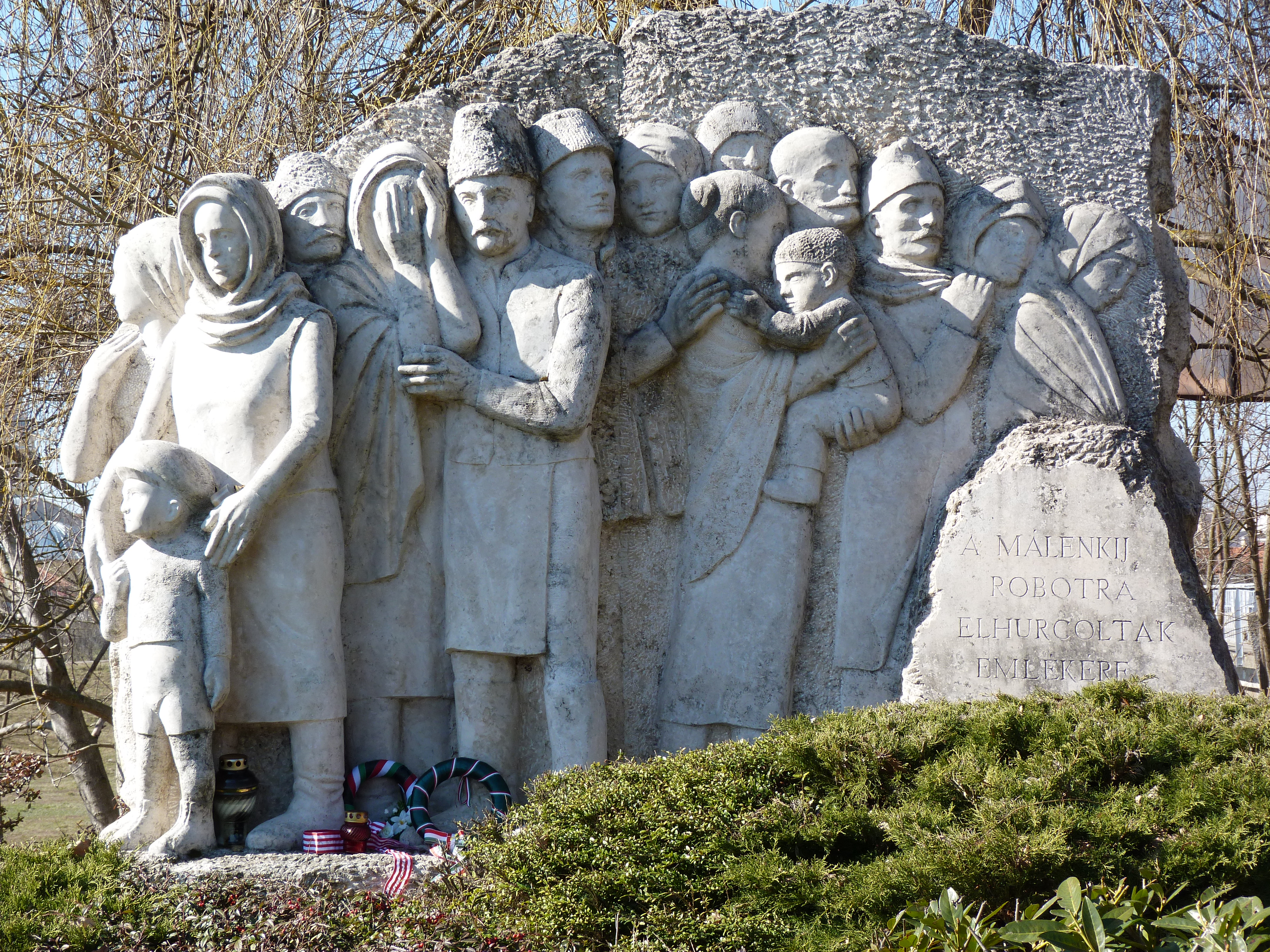 A felvételek 2013. Február 5 –én készültek Vásárosnaményben. Támási Áron emléklap, Művelődési Ház, Balázs József emléklapja, Malenkíj robotra elhurcoltak emlékműve, Kraszna. Tomcsányi kastély.